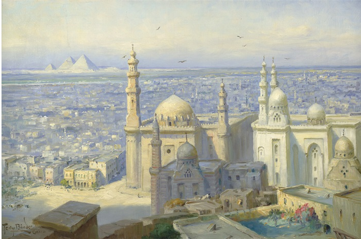 Blick über Kairo, Öl auf Leinwand, 50.5 x 76 cm